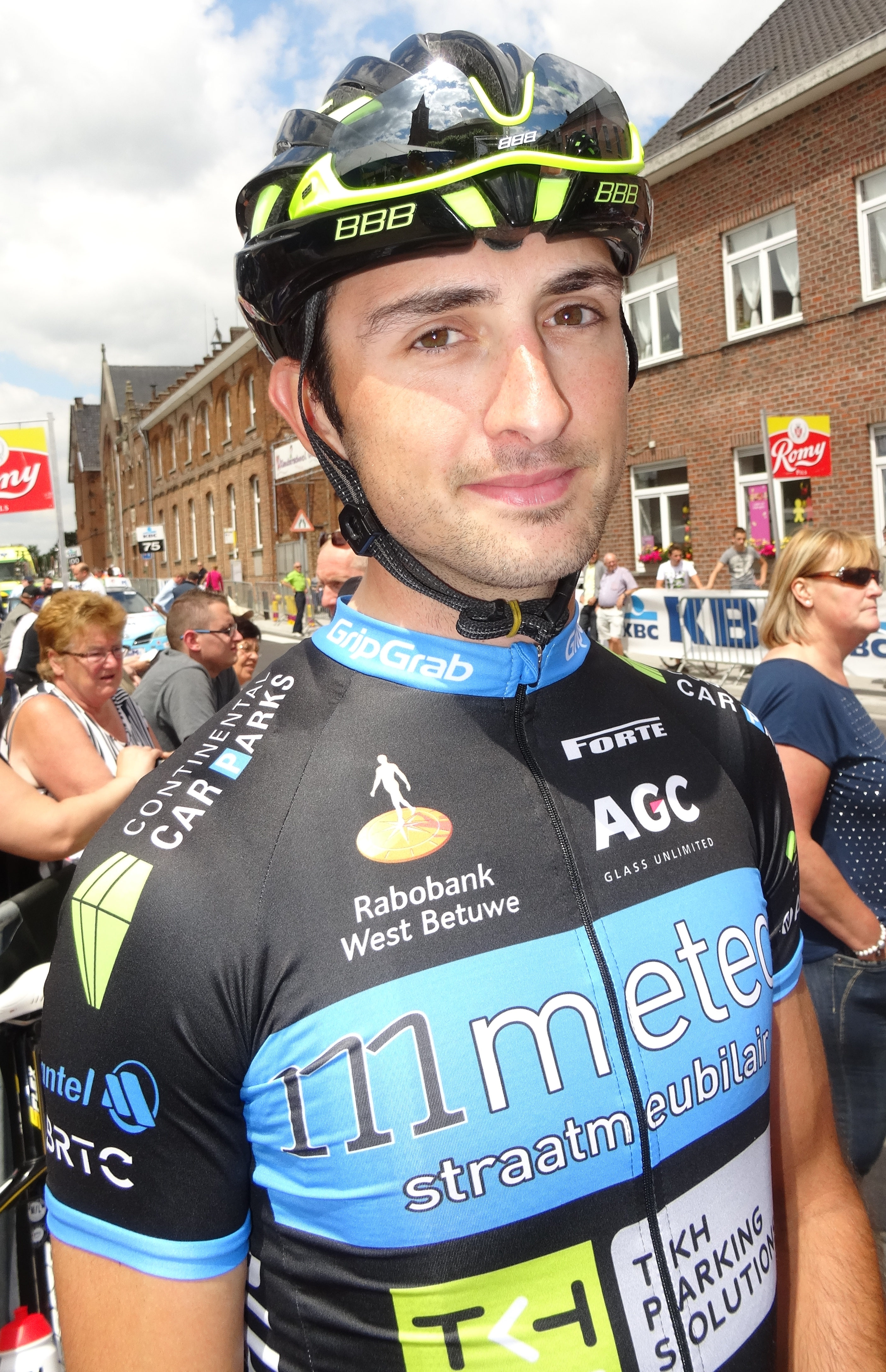 Reportage photographique réalisé le mercredi 25 juin à l'occasion du départ et de l'arrivée de l'Internationale Wielertrofee Jong Maar Moedig 2014 à Oetingen (Gooik), Belgique.